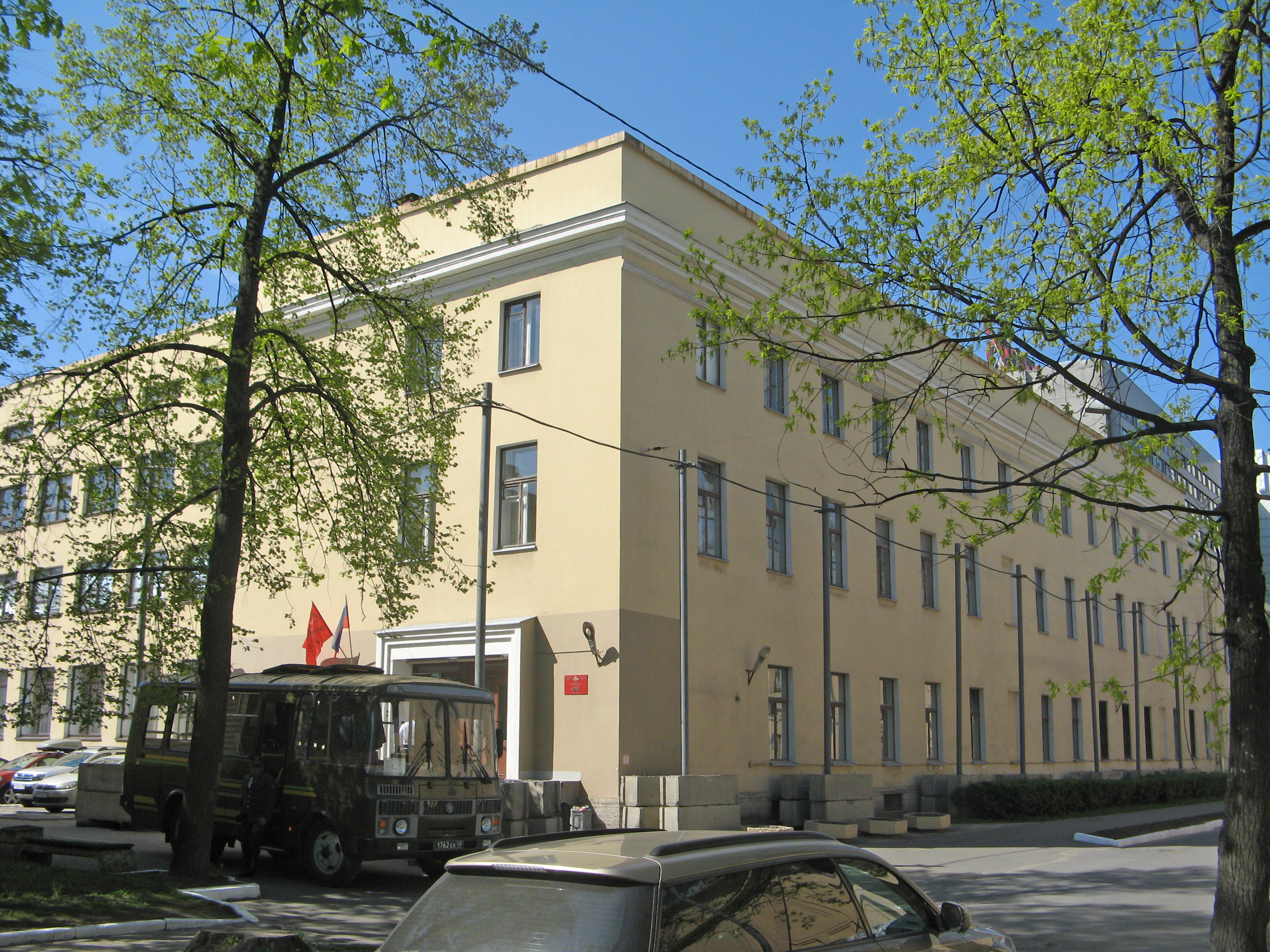 Санкт-Петербург, Ак. Лебедева 6В (Клиническая 8). Клуб ВМА